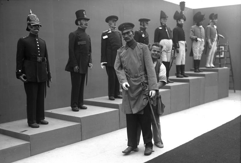 Der Hauptmann von Cöpenick auf der Ausstellung "Altes Berlin"! Das naturgetreue Wachsmodell des Hauptmann von Cöpenick, welcher in der nach ihm benannten Cöpenickade in der ganzen Welt von sich reden machte, wird in die Ausstellung "Altes Berlin" gebracht. Im Hintergrund eine Reihe von Schutzpolizisten aus alter und neuer Zeit. Information added by Wikimedia users.Die Ausstellung fand von 23. Mai bis 3. August 1930 in den Funkturmhallen statt.